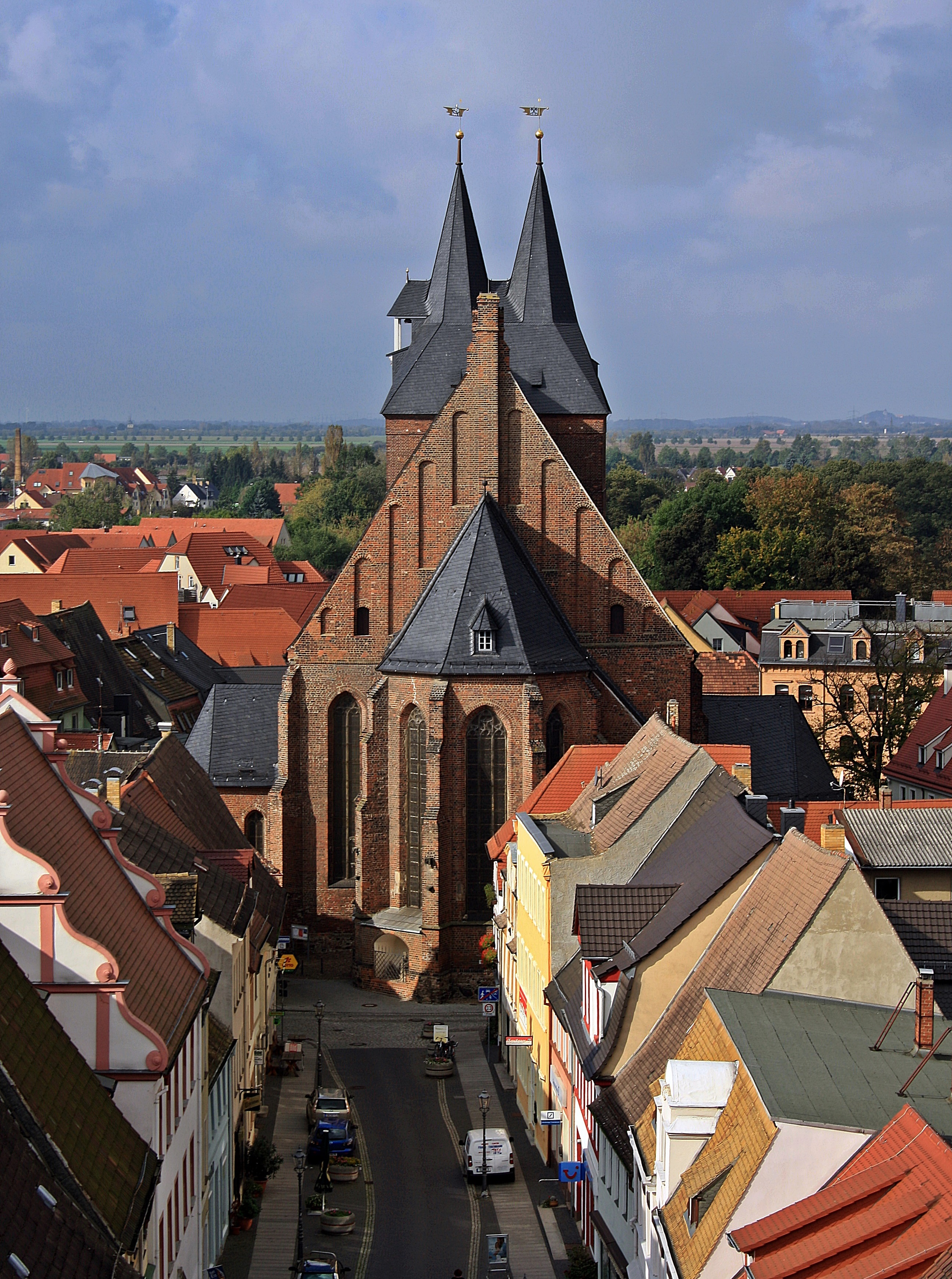 Stadtkirche St.Peter & Paul (Delitzsch) - Ostseite